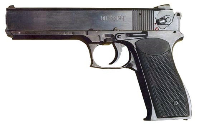 Pernach OTs-33